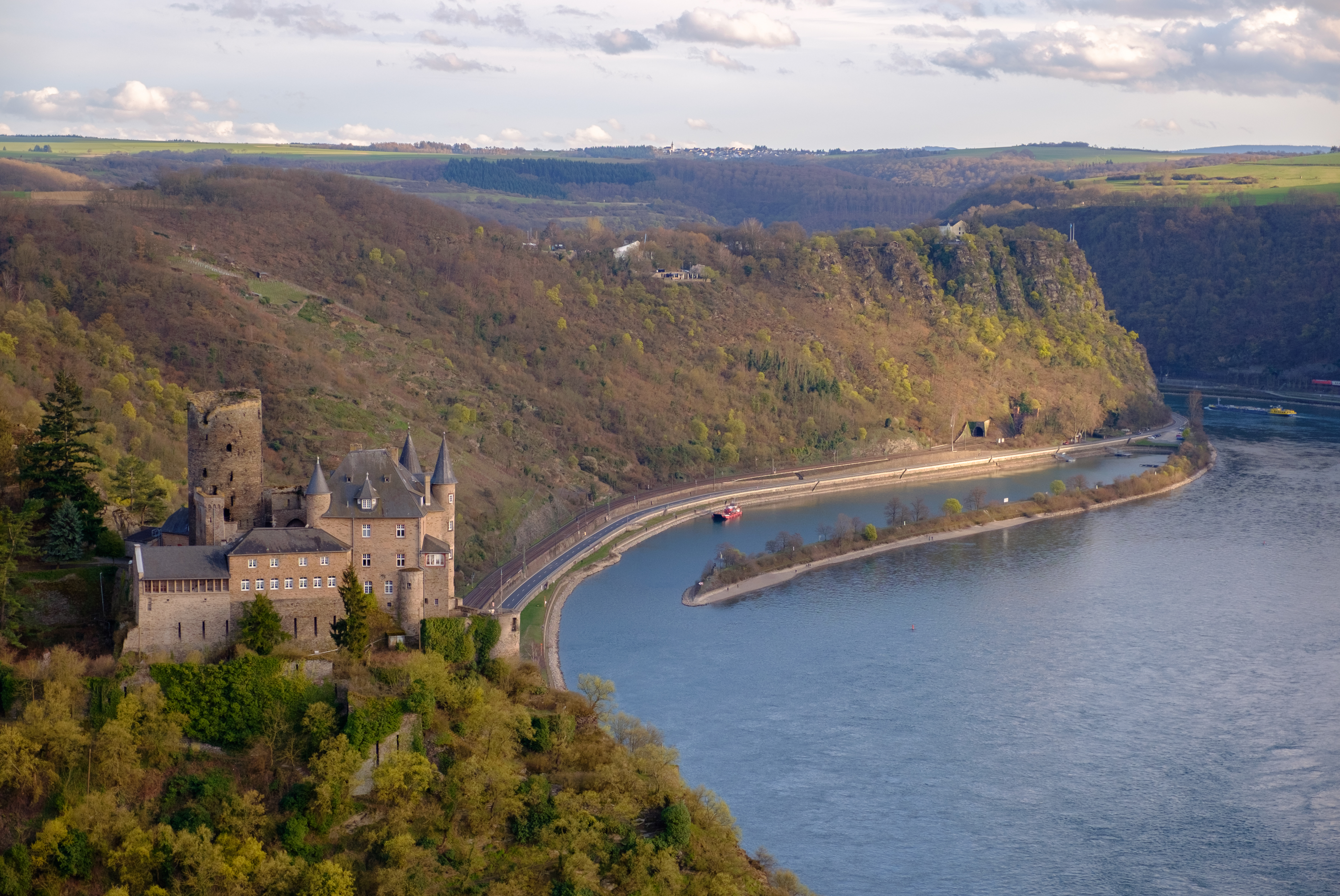 Burg Katz und Loreleyfelsen, von Dreiburgenblick bei Patersberg